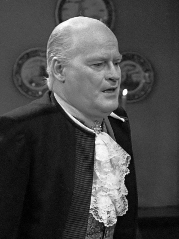 Opnamen TV-spel Een lampion voor blinde; Lo van Hensbergen 23 februari 1973